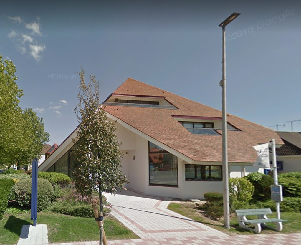 Le Touquet-Paris-Plage Maison des associations inauguration le 28 avril 1990